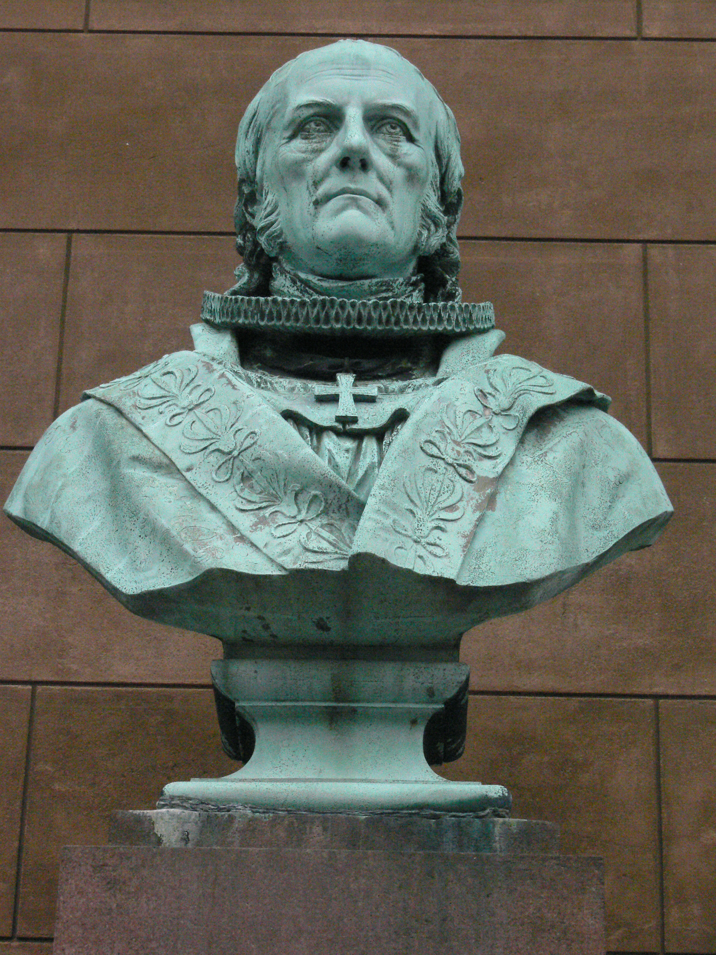 Jacob Peter Mynster (8. November 1775 - 30. Januar 1854). Theologe und Bischof.